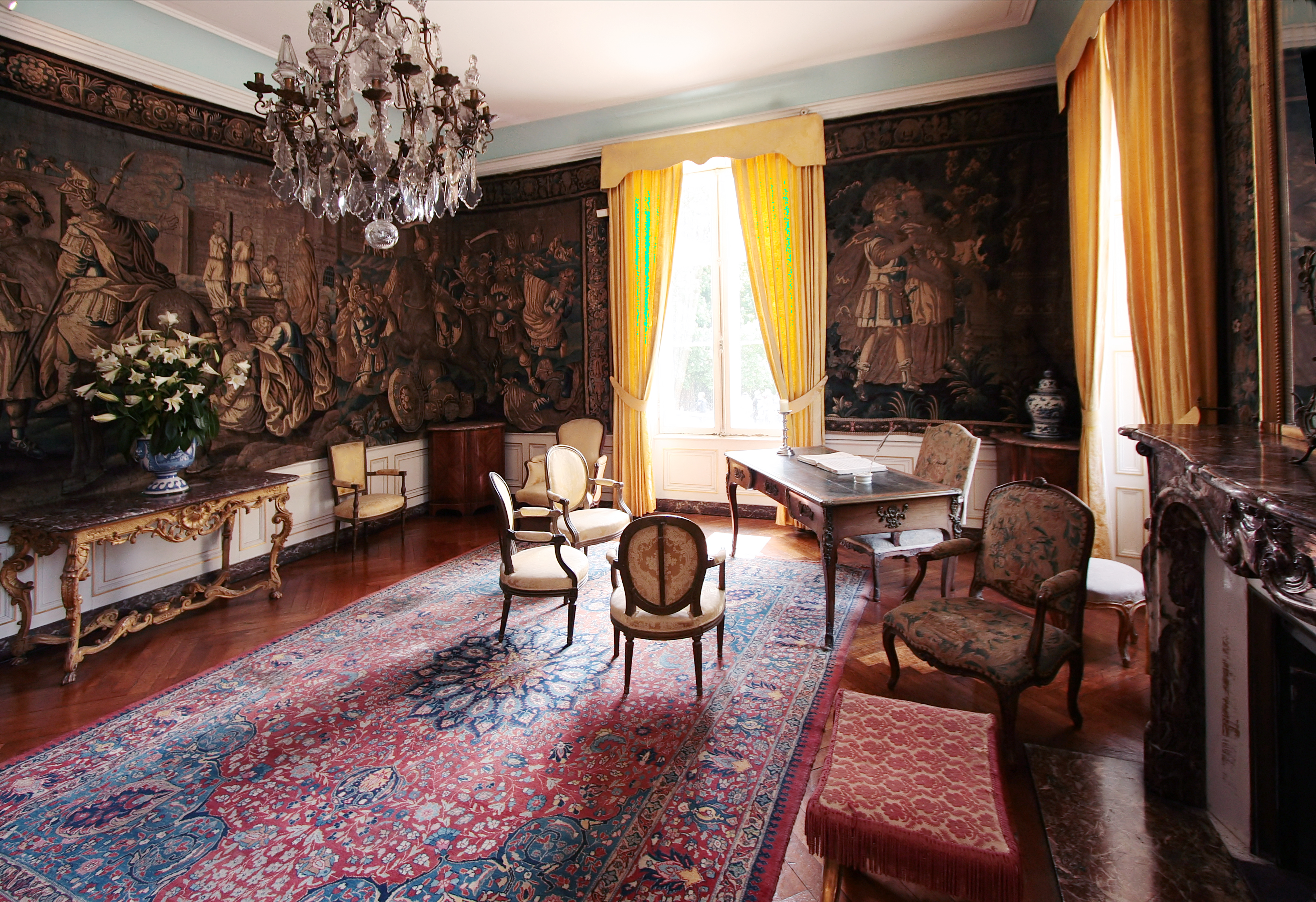 Schloss Clos-Lucé, Departement Indre-et-Loire/Frankreich - Kleiner Salon